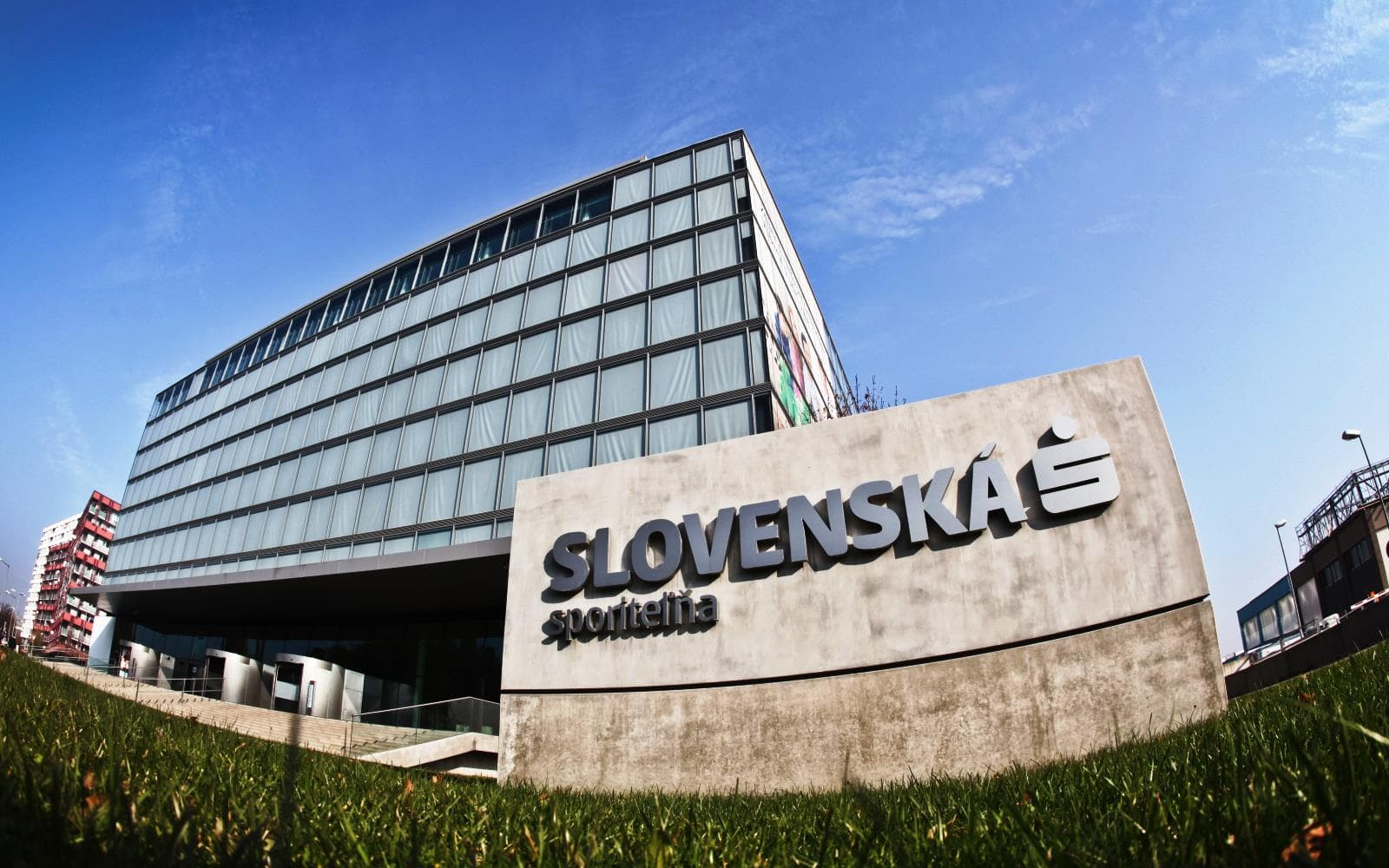 ústredie Slovenskej sporiteľne na Tomášikovej 48 v Bratislave